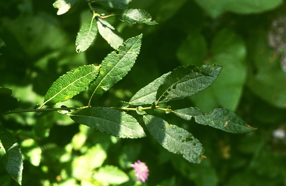 Großblatt-Weide (Salix appendiculata), Weidengewächse (Salicaceae) - Österreich/Austria/Autriche: Niederösterreich, Erlauftal E Gaming, Vordere Tormäuer